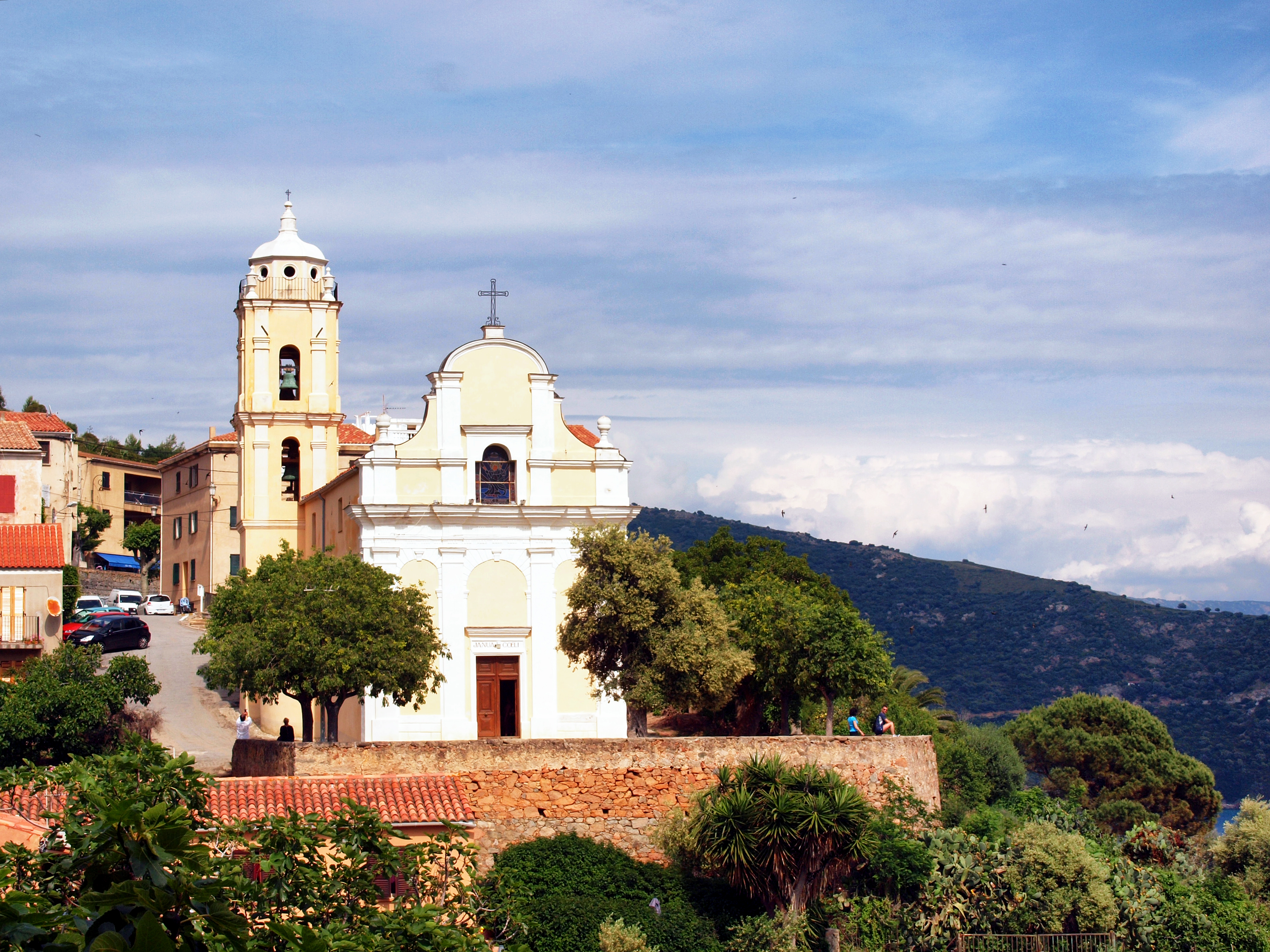 Cargèse, Corse-du-Suyd - L'église de l'Assomption dite « latine »